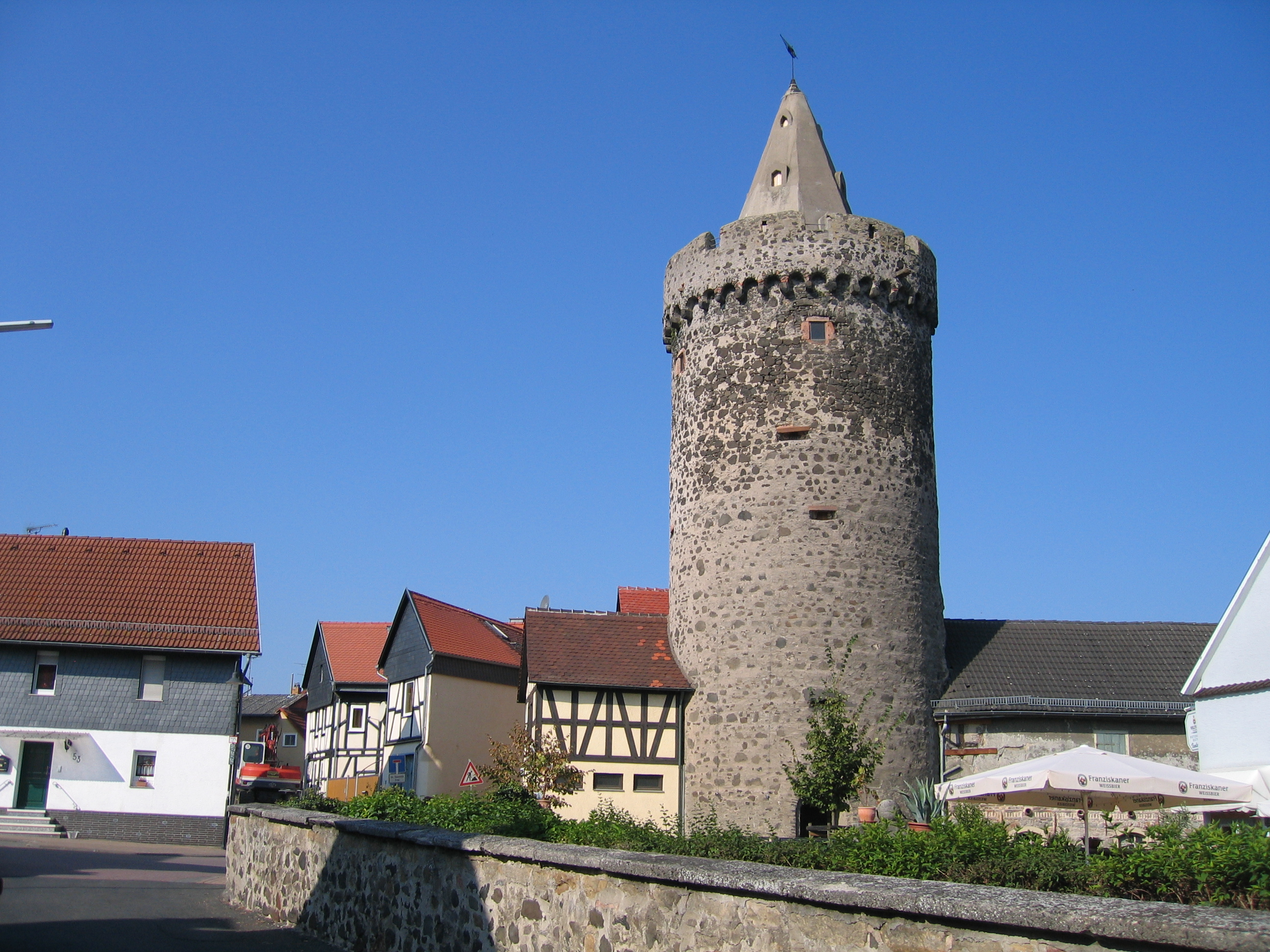 Weißer Turm in Wölfersheim.